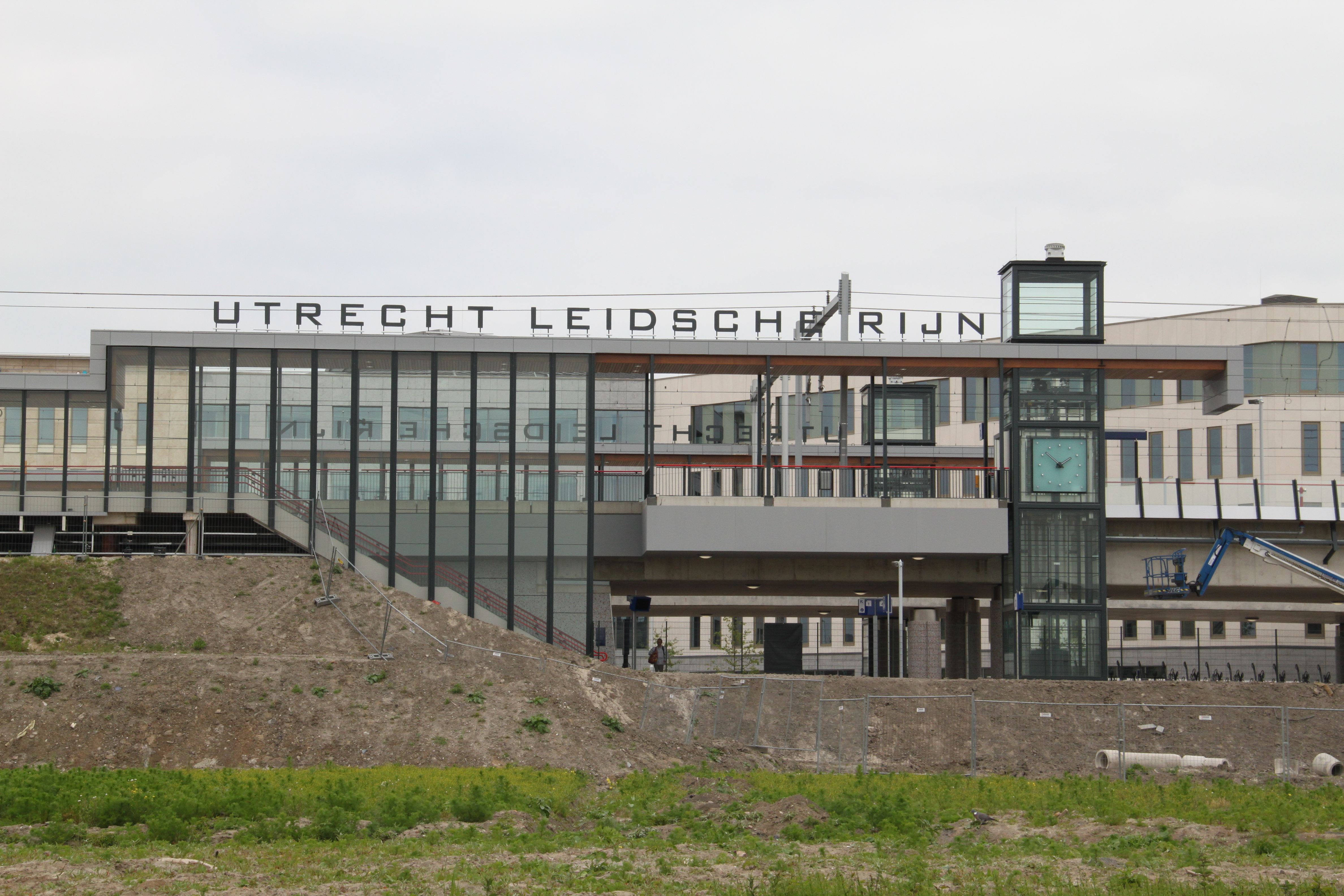 Station Utrecht Leidsche Rijn is op 9 juni 2013 geopend als nieuw station op de spoorlijn Utrecht - Woerden